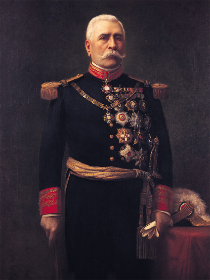 Retrato del entonces Presidente de México Porfirio Díaz Mori (1830-1915)